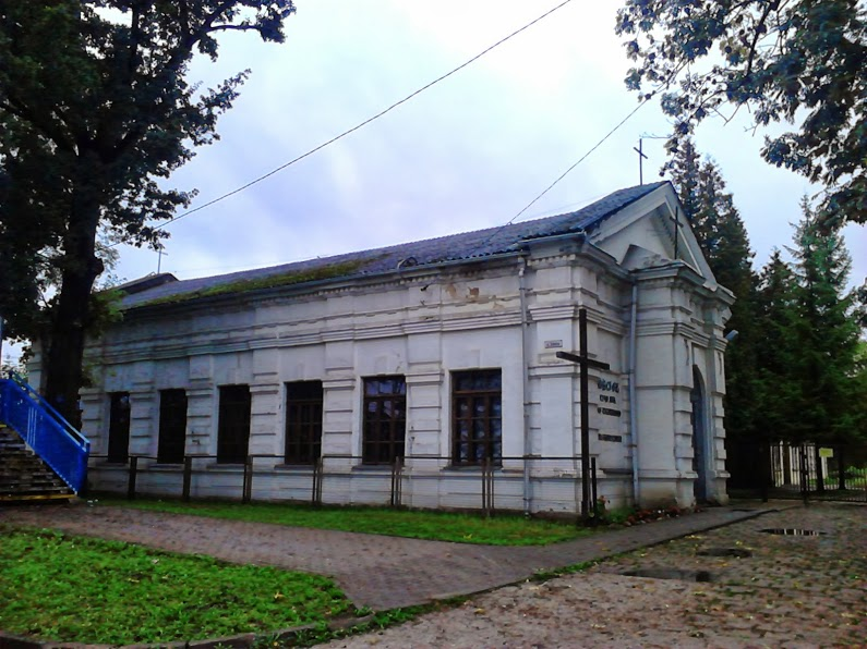 Dawna cerkiew w Starosielcach, ob. kościół św. Stanisława Biskupa